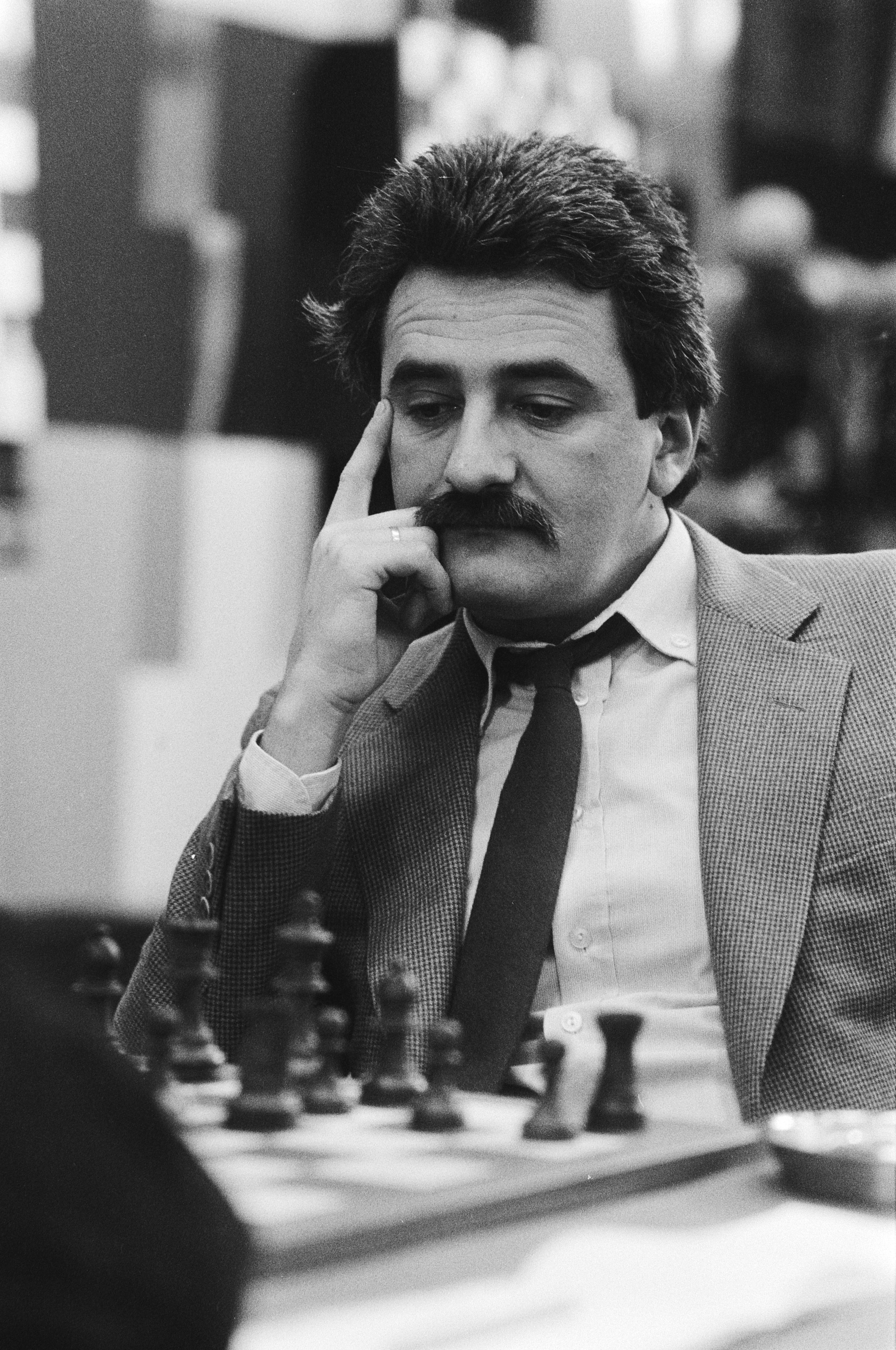 Collectie / Archief : Fotocollectie Anefo Reportage / Serie : Hoogovens-schaaktoernooi, 4e ronde Beschrijving : Schaker in actie Annotatie : Randnummers negatiefstrook: nr. 23 Hulak in actie, Datum : 18 januari 1983 Locatie : Noord-Holland, Wijk aan Zee Trefwoorden : schaakwedstrijden, schaken Persoonsnaam : Hulak, Olafsson, Fridrik Instellingsnaam : Hoogovenschaaktournooi Fotograaf : Bogaerts, Rob / Anefo Auteursrechthebbende : Nationaal Archief Materiaalsoort : Negatief (zwart/wit) Nummer archiefinventaris : bekijk toegang 2.24.01.05 Bestanddeelnummer : 932-4704